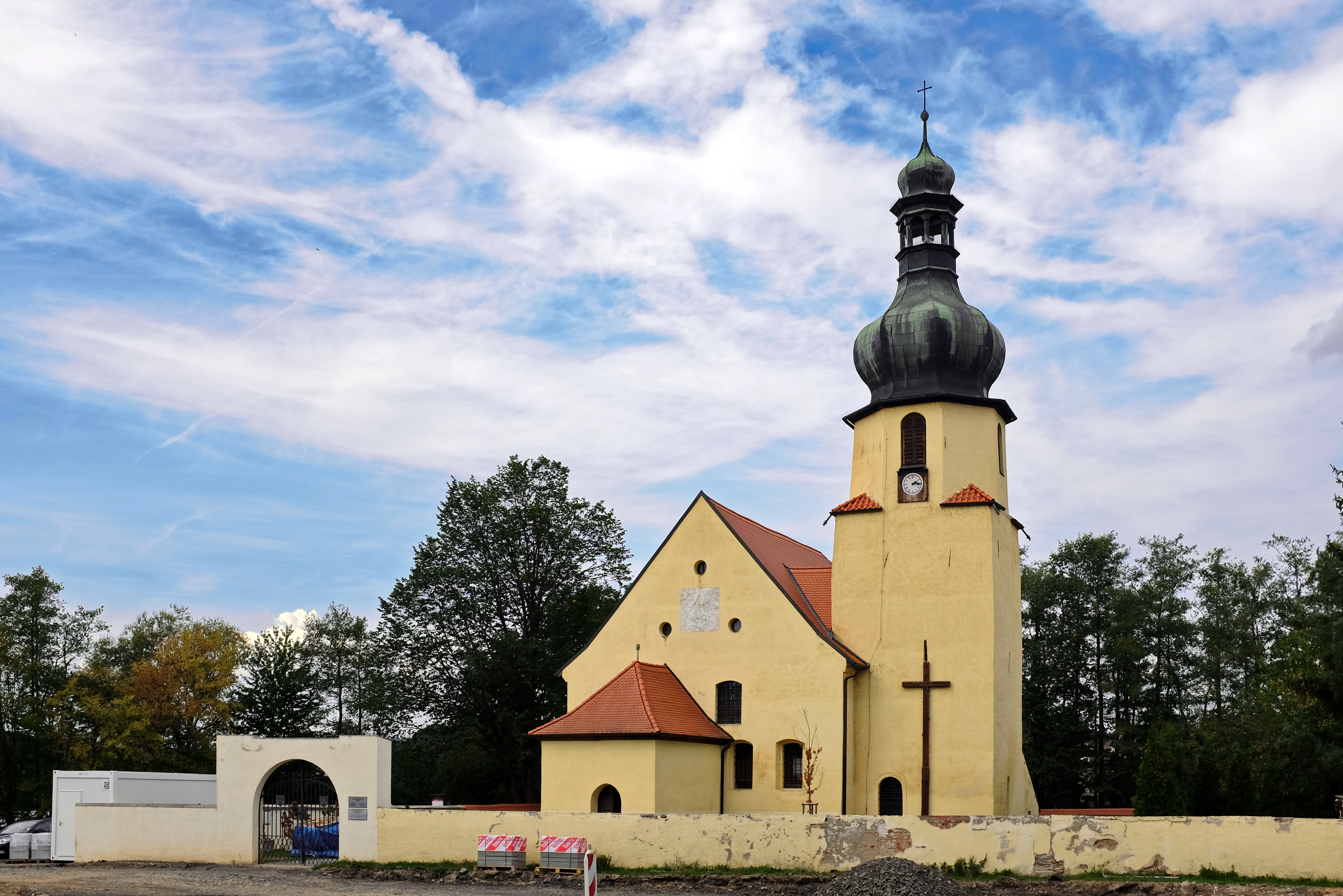 Kostel svatého Jakuba, Pomezí nad Ohří.